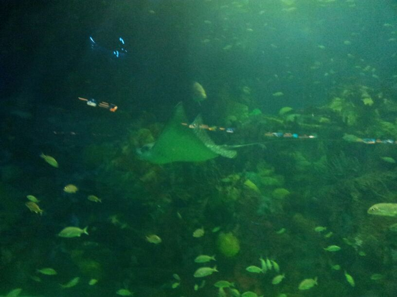 Las causas del deterioro del hábitat costero son la deforestación, los vertidos químicos industriales, fertilizantes y pesticidas, vertidos de petróleo, aguas residuales y la sobrexplotación pesquera.